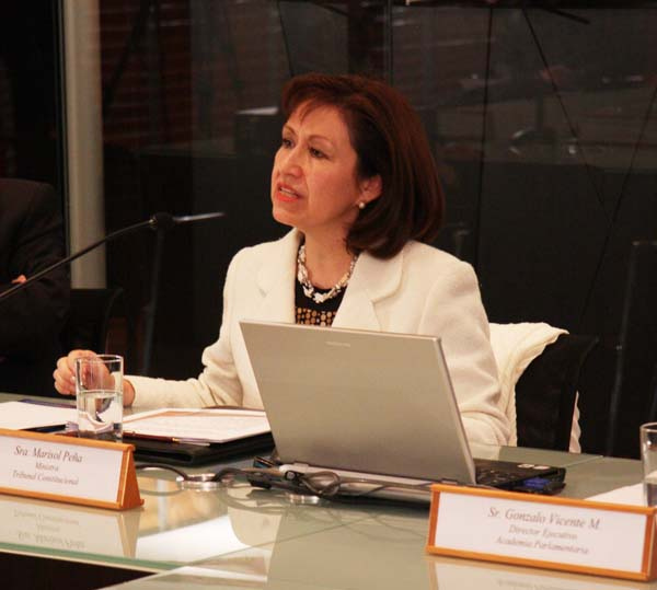 Analizar el rol y funcionamiento del Tribunal Constitucional (TC), así como su incidencia en el proceso legislativo, fue el objetivo del seminario organizado por la Academia Parlamentaria de la Cámara de Diputados y que se desarrolló este lunes 26 de abril en la sede de la Biblioteca del Congreso Nacional (BCN), en Valparaíso.